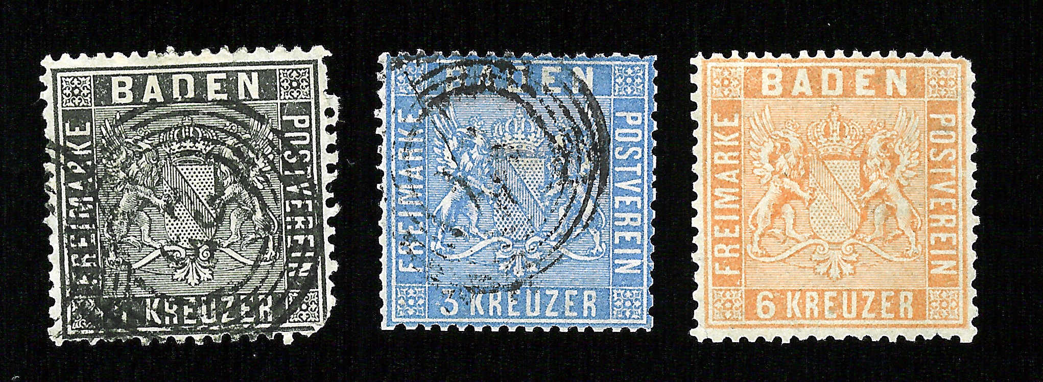 Erstellt von Martin Dürrschnabel Die ersten badischen Briefmarken mit dem Wappen, aus dem Jahren 1860-1861. Michel N°9-10-11.